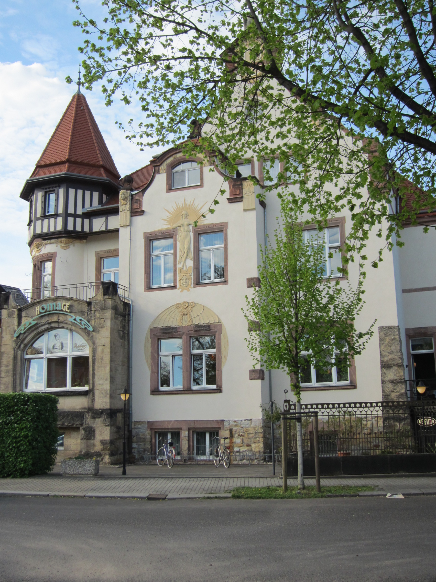 Das denkmalgeschützte Haus Wasaplatz 1 in Dresden-Strehlen, von Süden